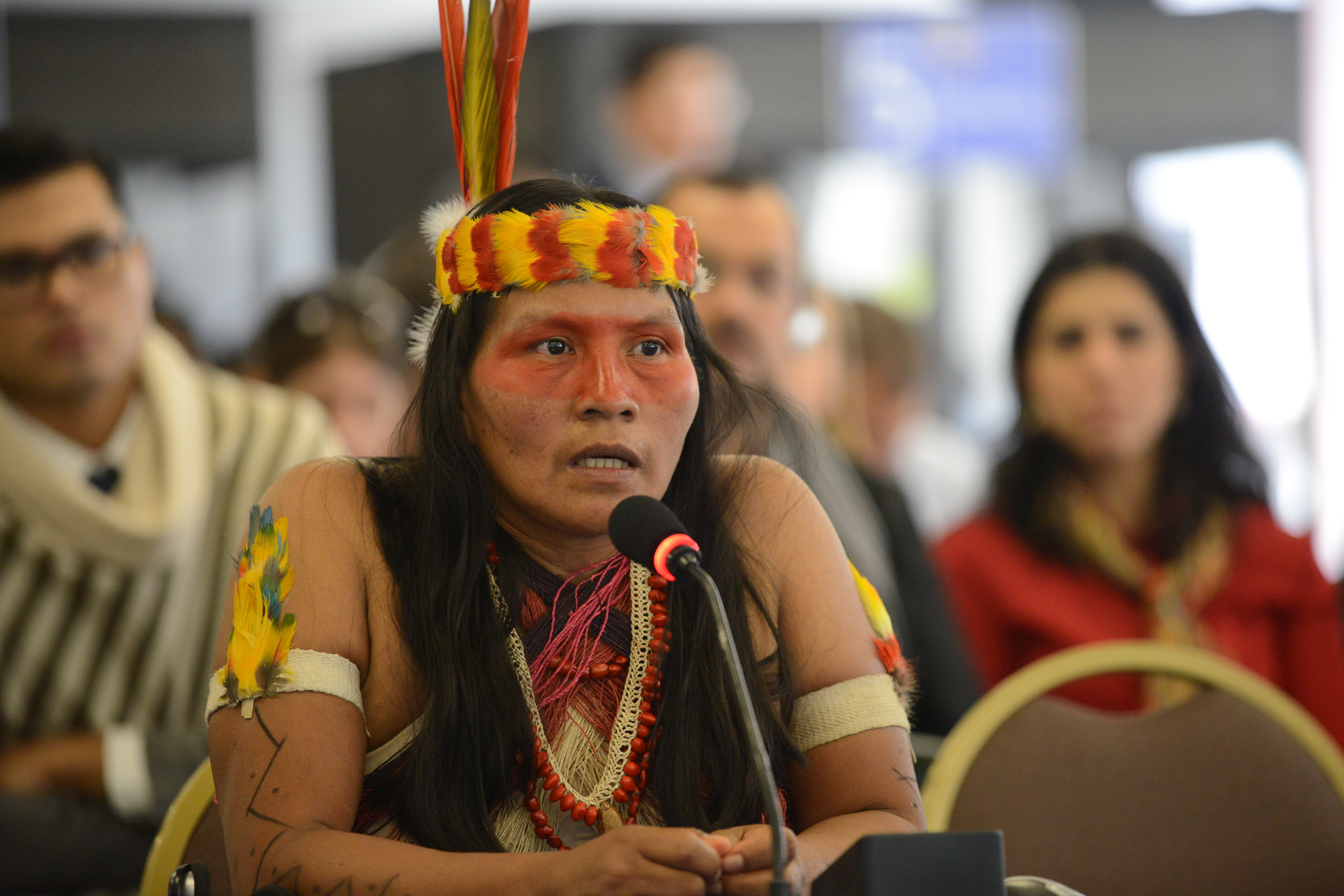 Ecuador: Caso Tagaeri y Taromenani 156 Período Ordinario de Sesiones 19 de octubre de 2015 Hablando en el micrófono, testigo de la audiencia: Alicia Cahuiya, vicepresidenta de la Nacionalidad Waorani del Ecuador (NAWE)